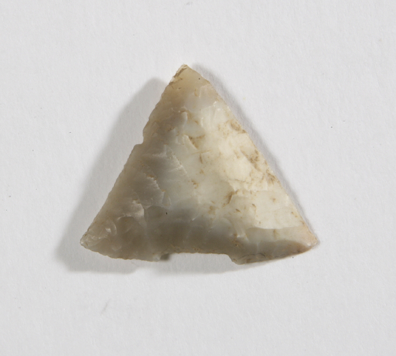 Punta di freccia con base squadrata, appartenente a una tipologia ritenuta caratteristica del Vaso Campaniforme, per cacciare, ma anche per uso bellico. Prodotto della scheggiatura della pietra.